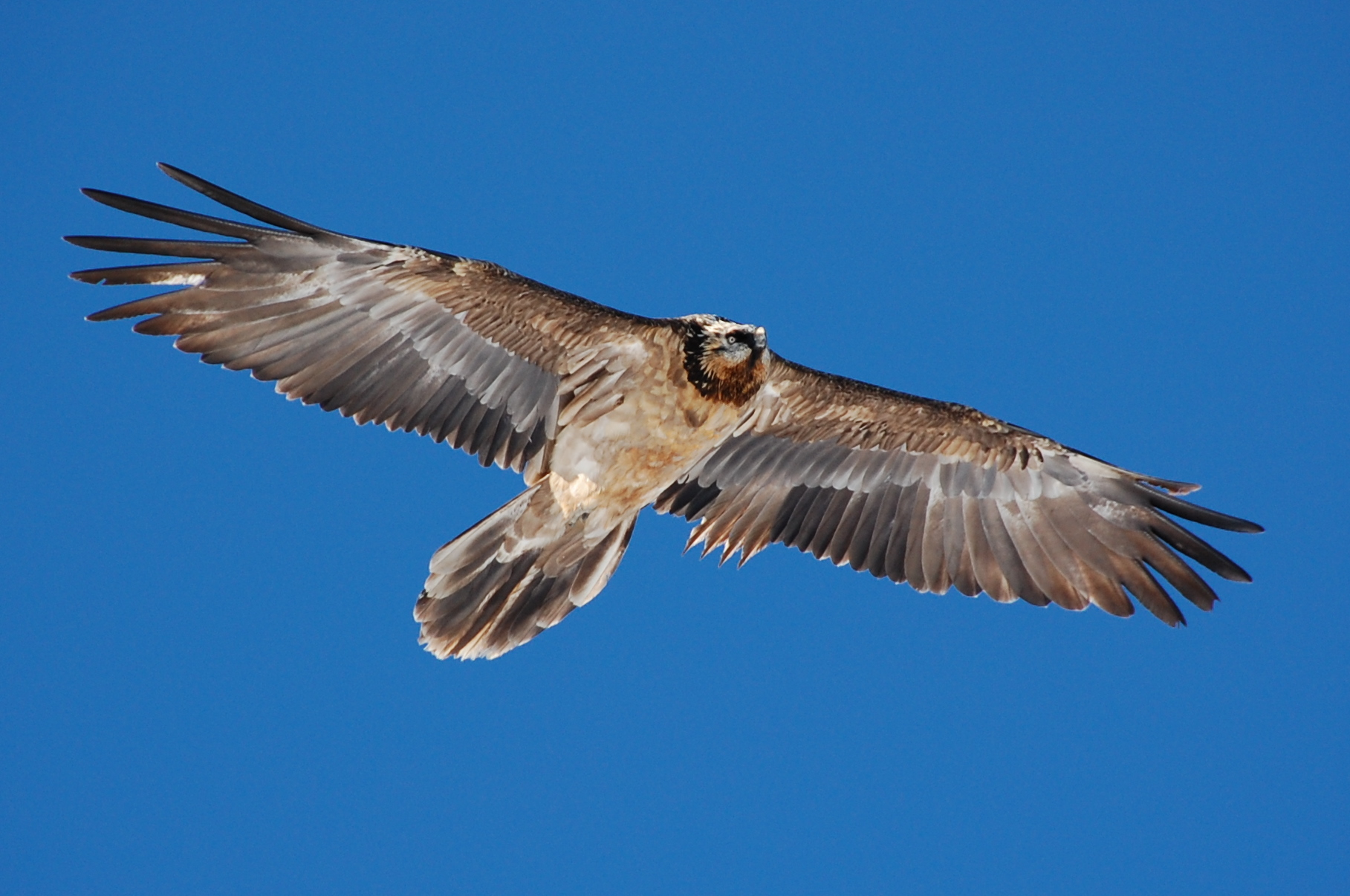 Lammergeier Gypaetus barbatus, immature; Mürren, Berne, Switzerland (reintroduced population).